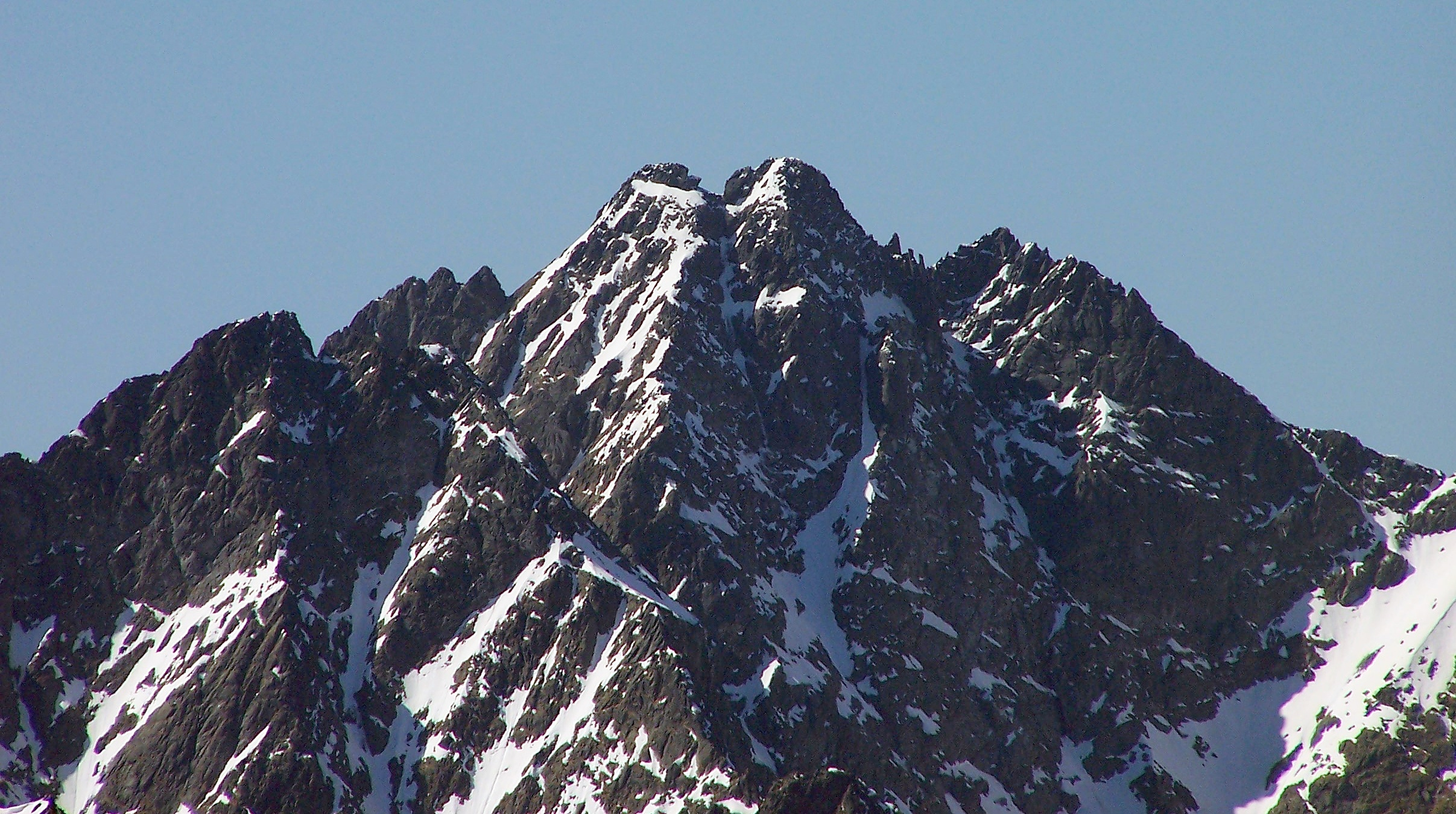 Vysoká